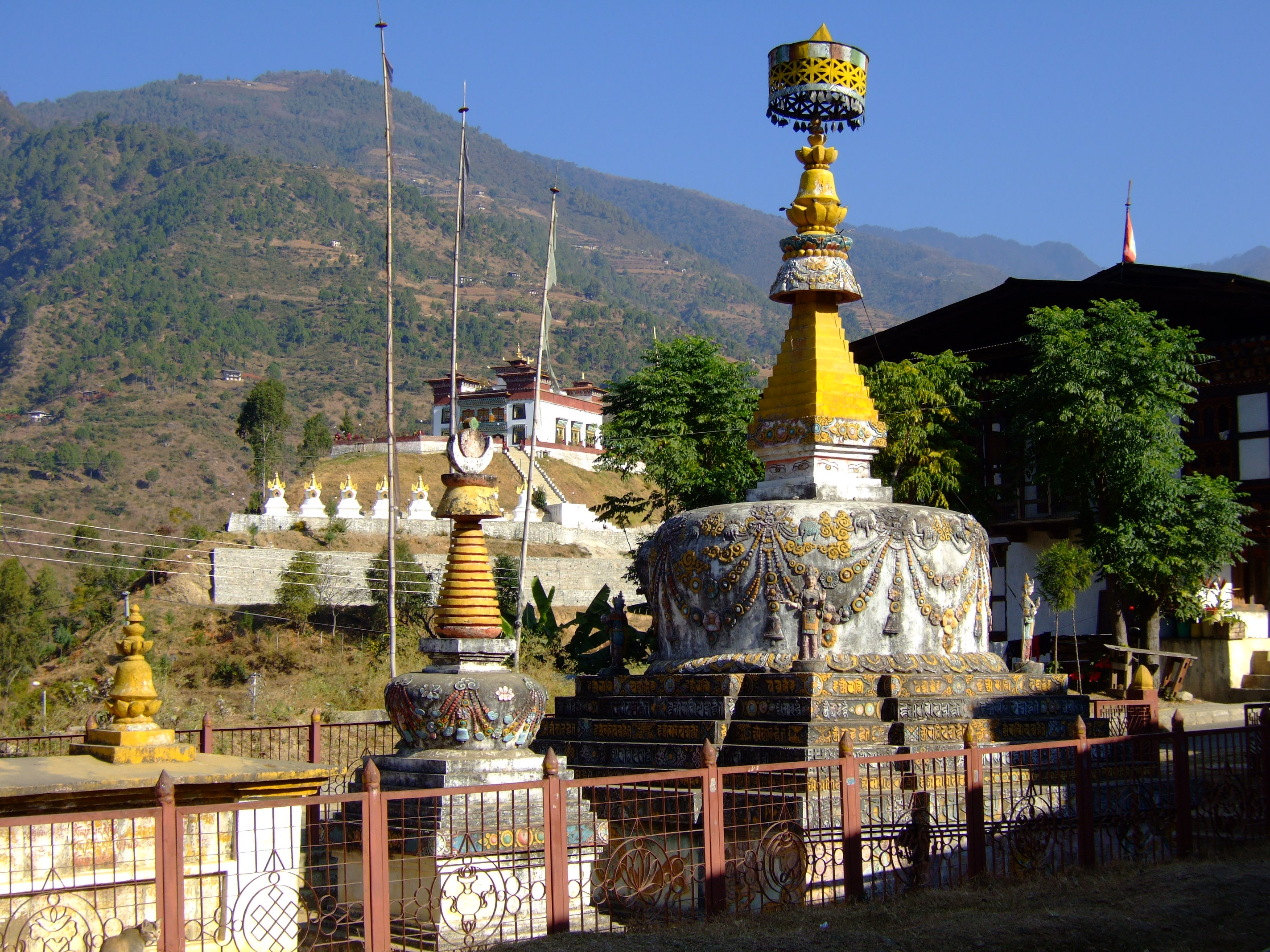 Buddhist Stupas, Rangjung, Trashigang District, Bhutan